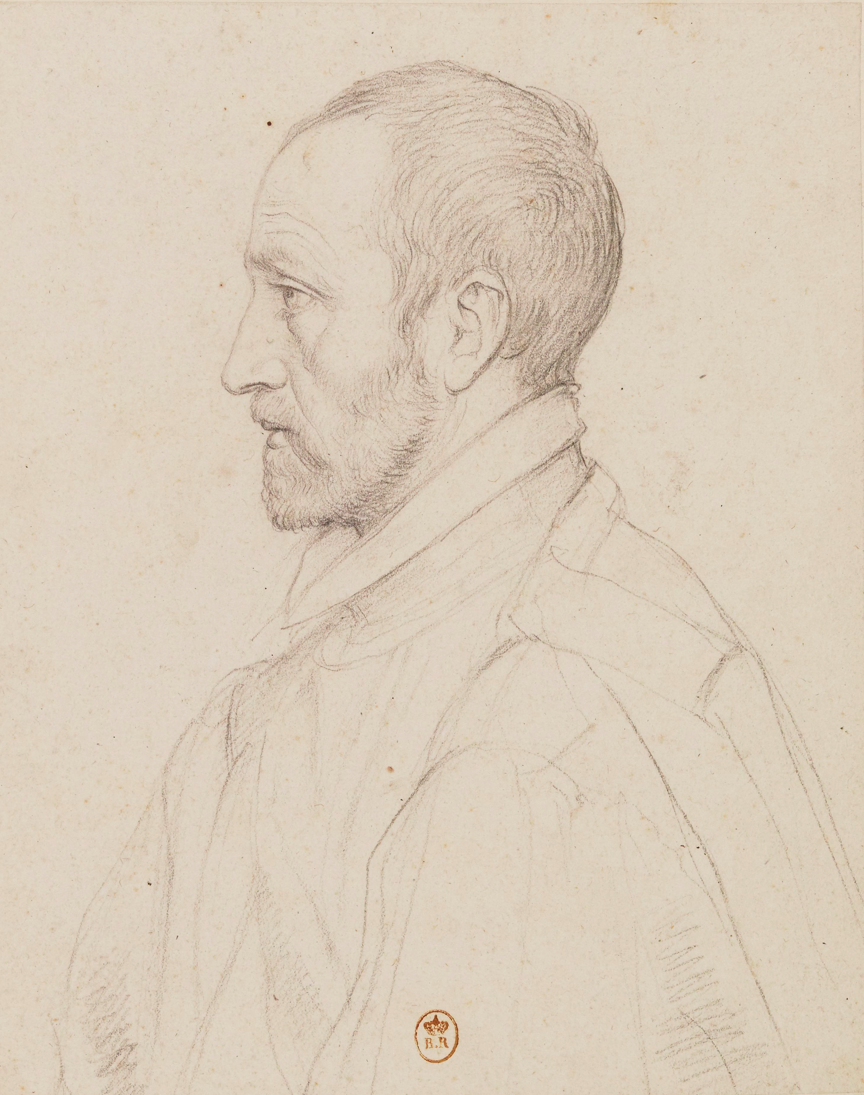 Portrait de Jean Dorat.